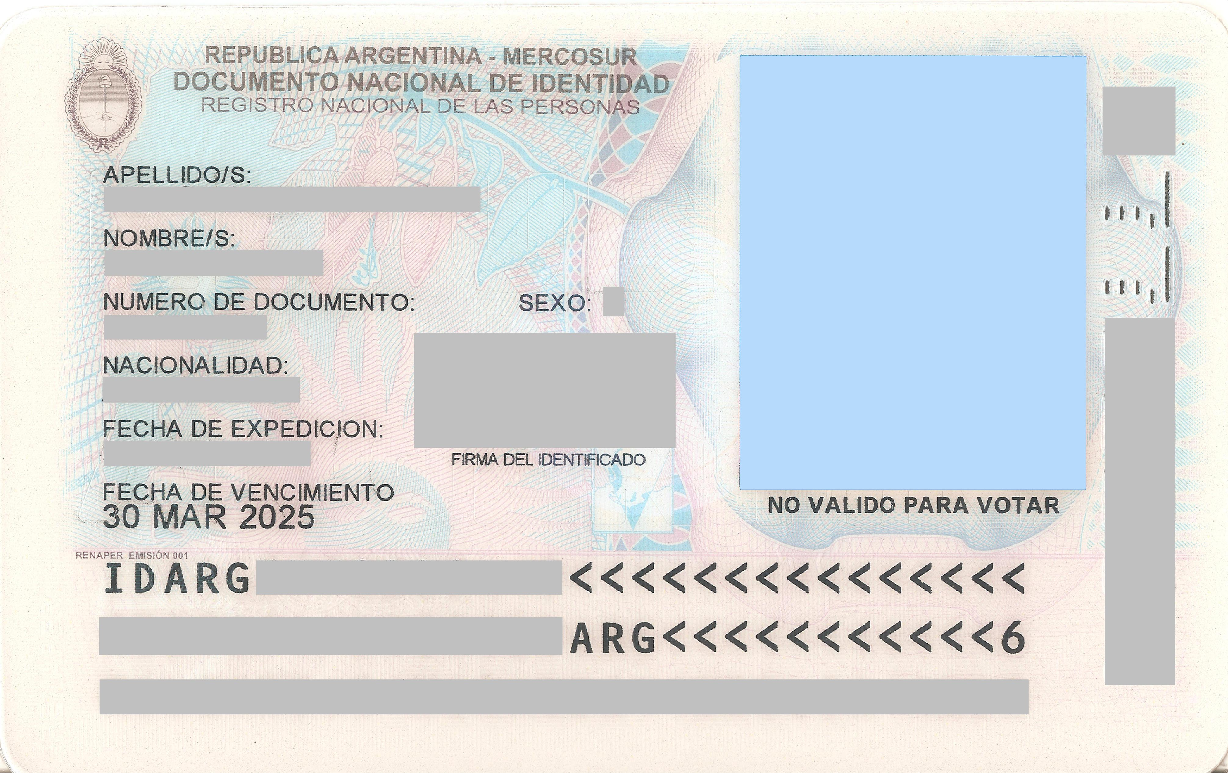 DNI Tarjeta